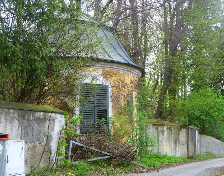 Rauchenbichlerhof in Salzburg, Pavillon am Grundstücksrand nahe der Ecke Linzer Bundesstraße / Sterneckstraße